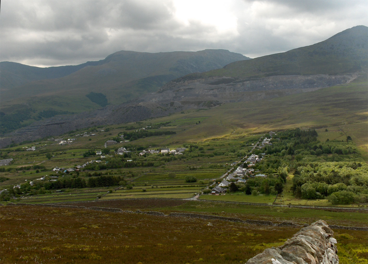 Mynydd Llandegai (Mynydd Llandygai), seen from the slopes of Moel y Ci. The mountains in the background are Carnedd Llywelyn (left-hand edge), Carnedd Dafydd, Pen yr Ole Wen and Elidir Fawr (right), with the Penrhyn Slate Quarry.